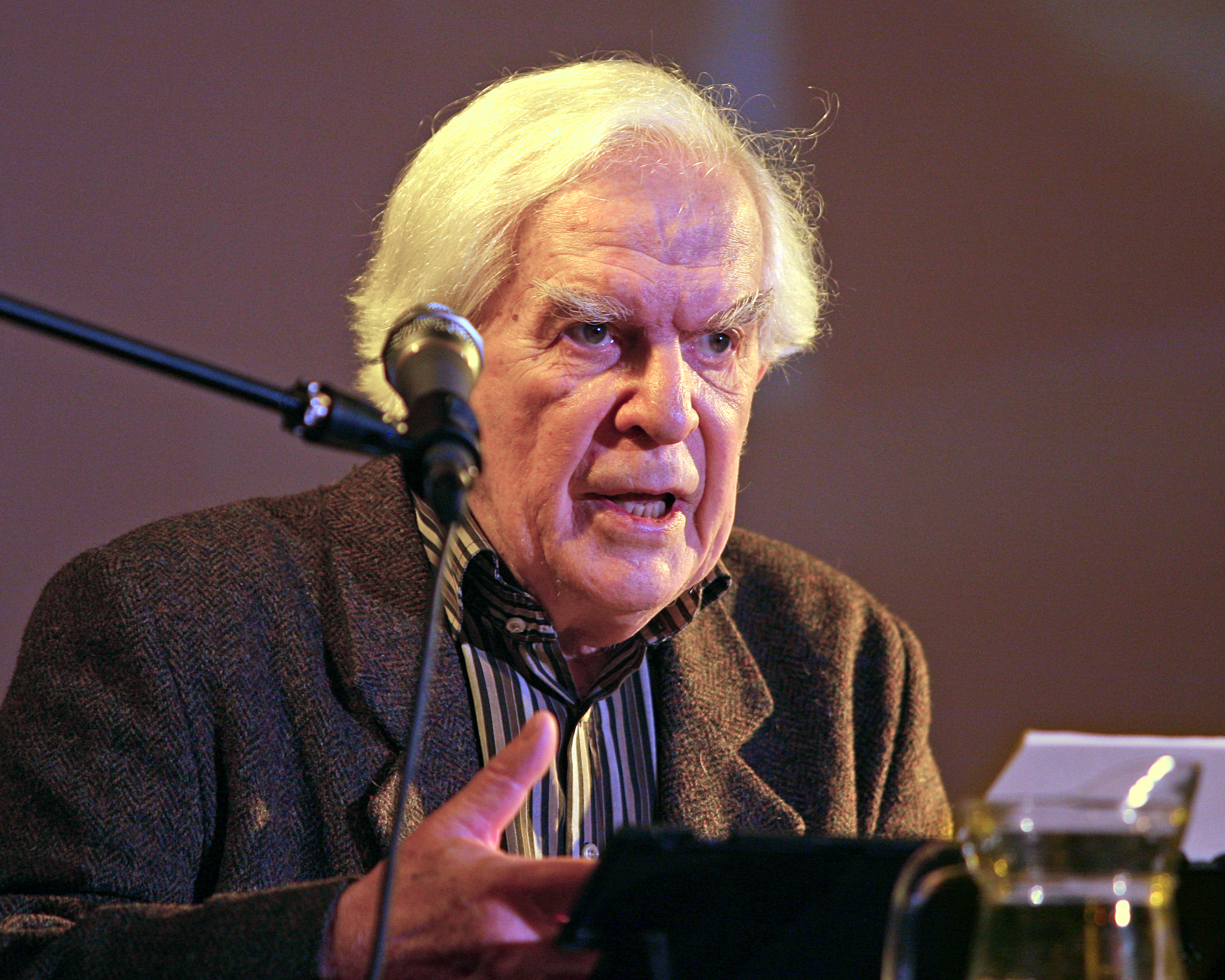 Bo Bjelfvenstam, filmskapare, berättar på Vaxholms Bion